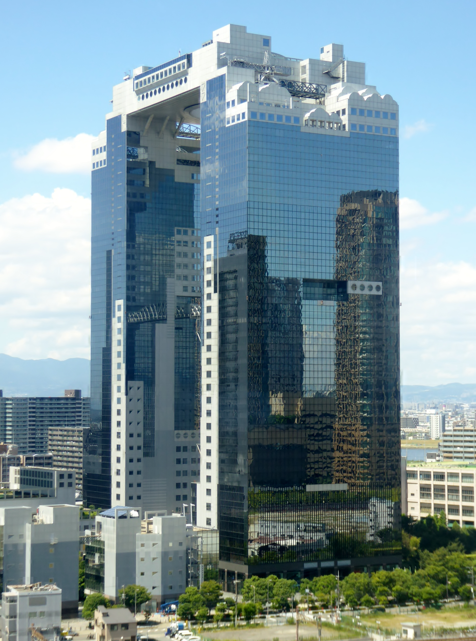 梅田スカイビルを撮影。